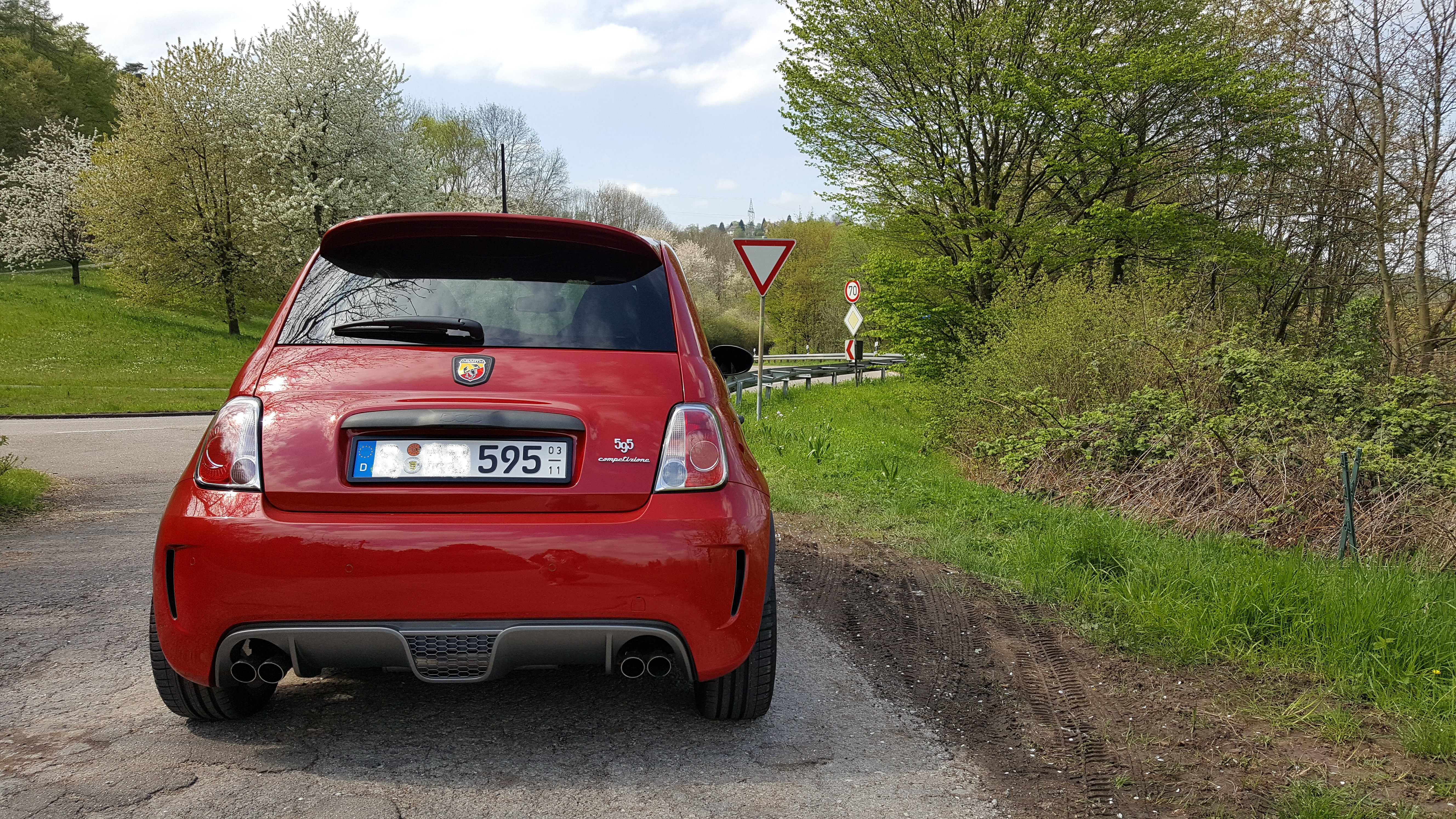 Rosso Tristrato (Cordolo Rot)